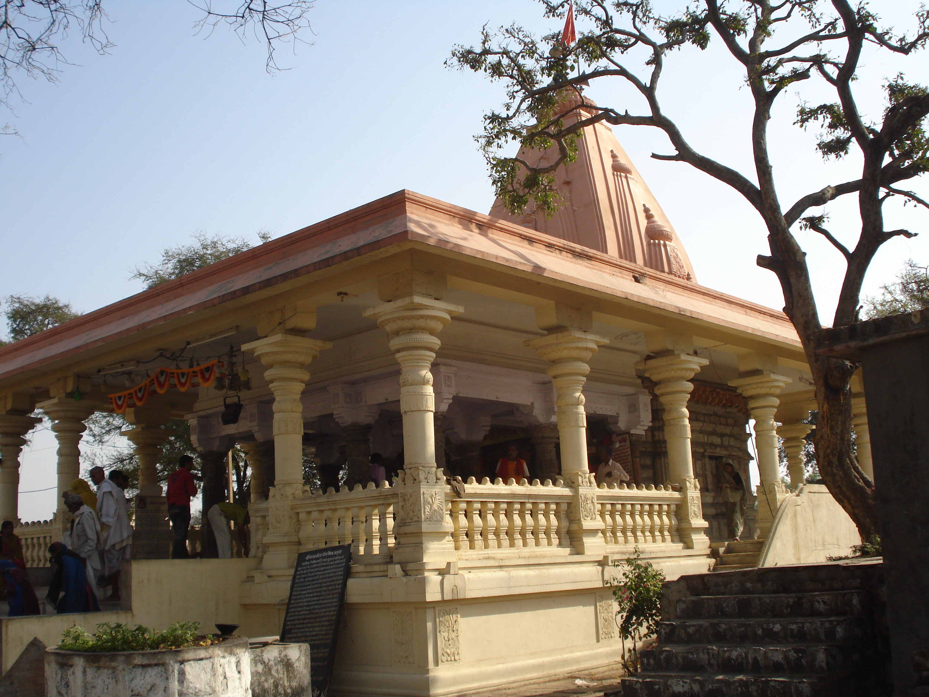 Kalabharava Temple at Ujjain, Madhya Pradesh, India